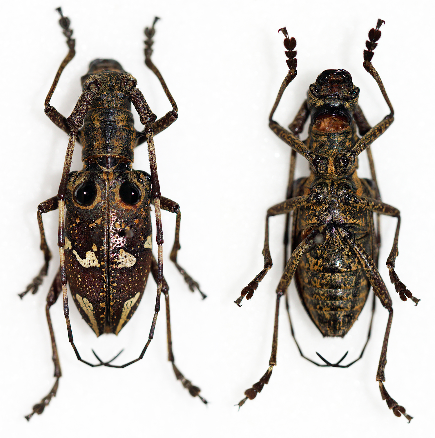 Pic,1917 Sex: Female Data: 06-2014 - Sapa MT - Lao Cai Prov - Vietnam Size: ?